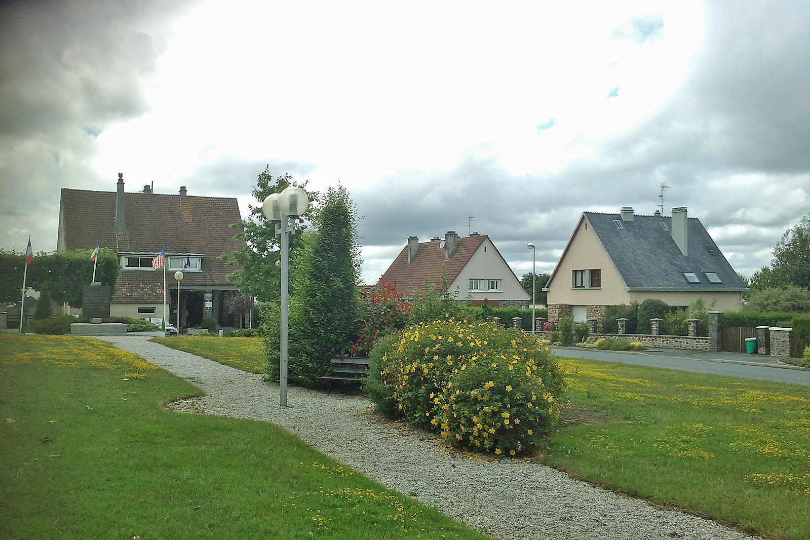 place devant l'église